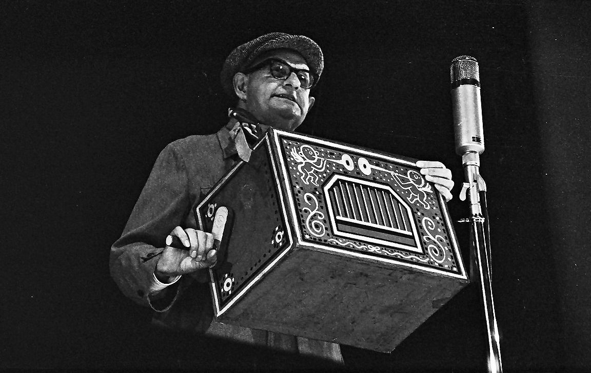 Freiburg: Stadthalle; Die Insulaner; Ewald Wenck mit Leierkasten